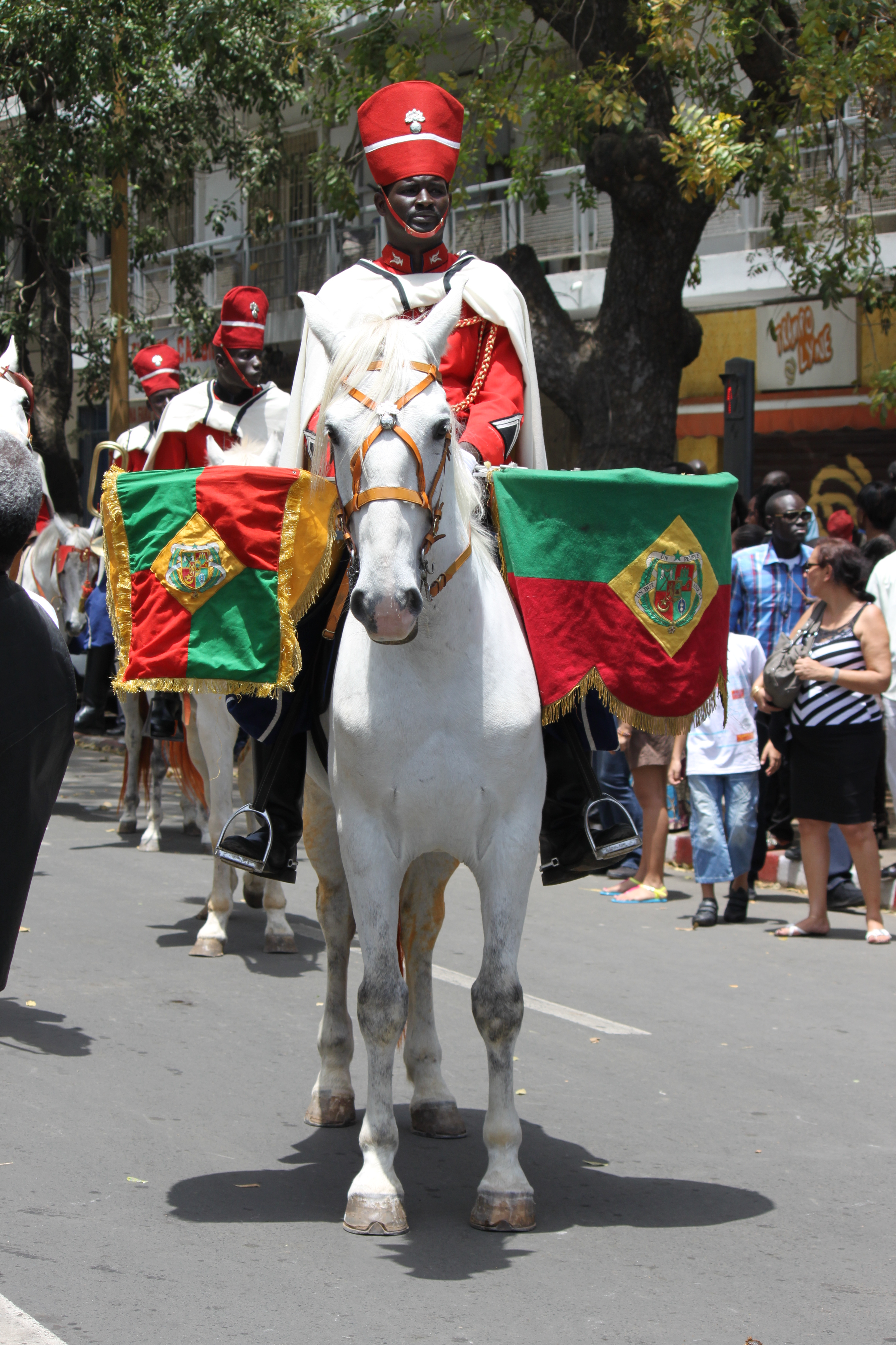 Spahis sénégalais lors de l'Investiture de Macky Sall à Dakar, Sénégal, le 2 avril 2012.